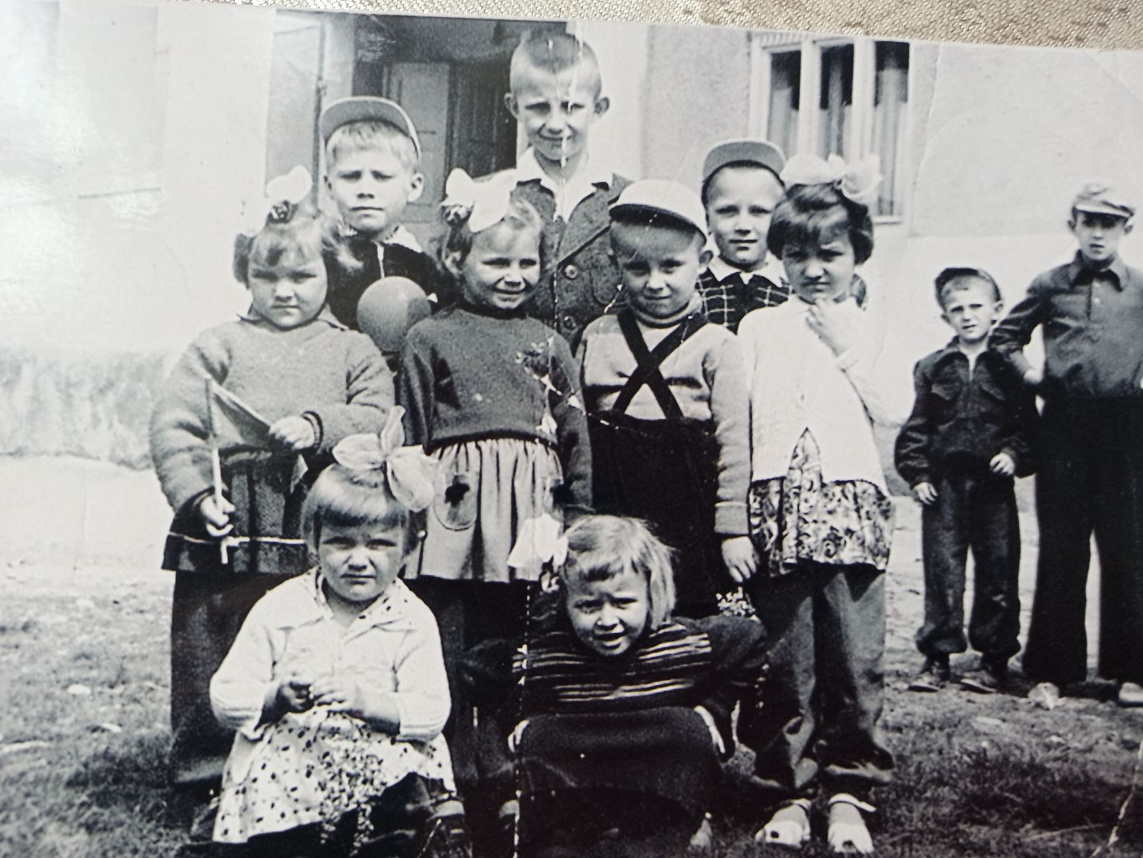 Фото дітей вчителів з села Онок Закарпатська область